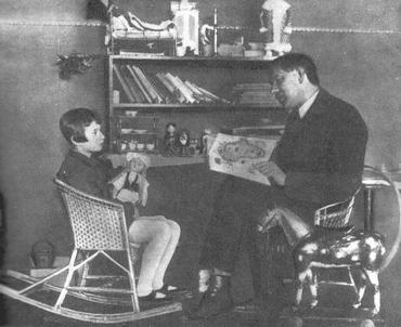 Chukovskij reading poetry daughter Mouret. 1925